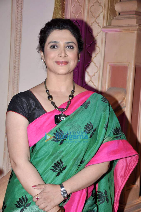 Supriya Pilgaonkar at Aamir Khan promotes Talaash on Star Pariwar